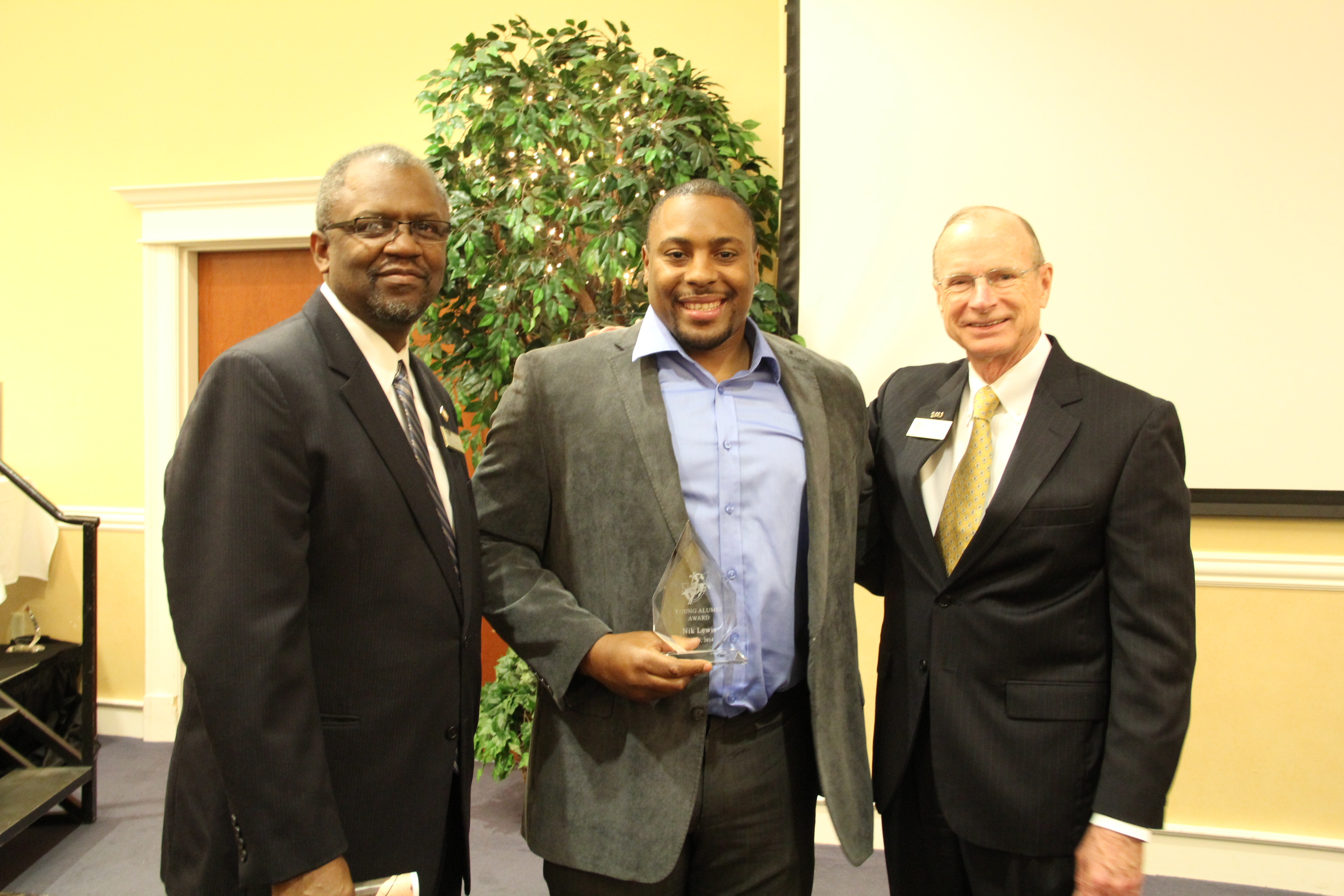 Alumni Awards Banquet and Dinner 2014